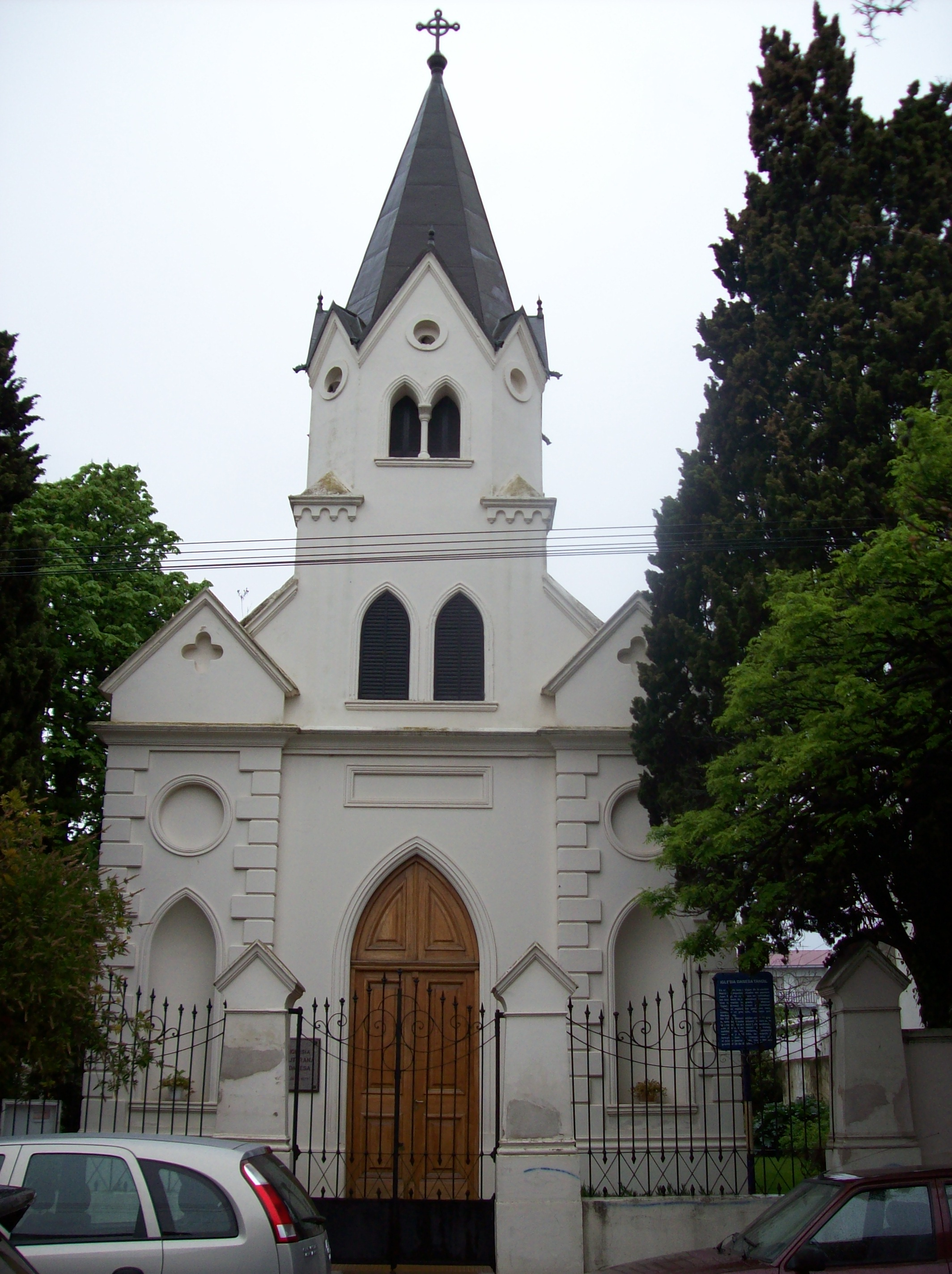 Iglesia luterana danesa en Tandil, Provincia de Buenos Aires, Argentina.